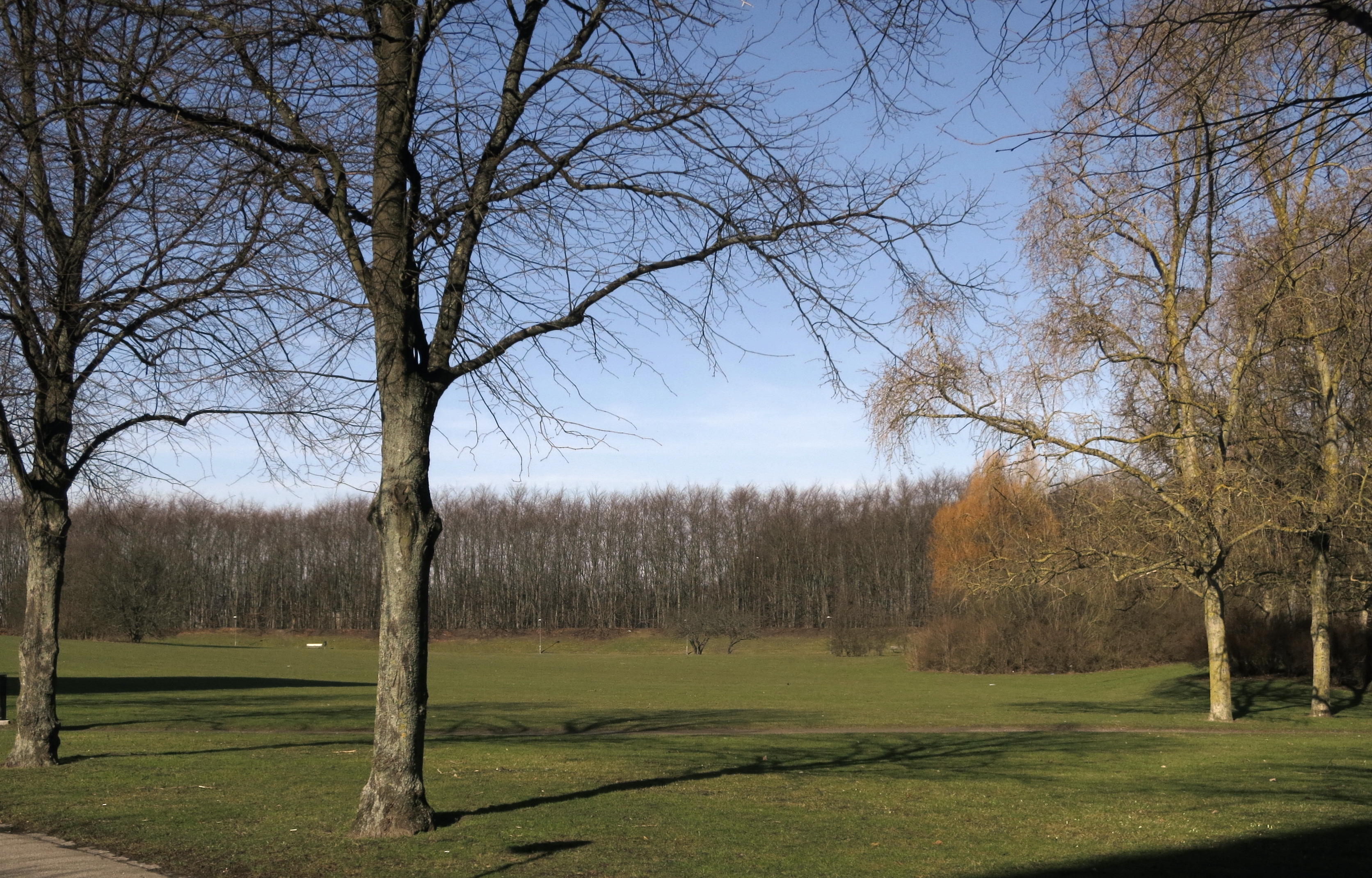 Cronhielmsparken i Malmö